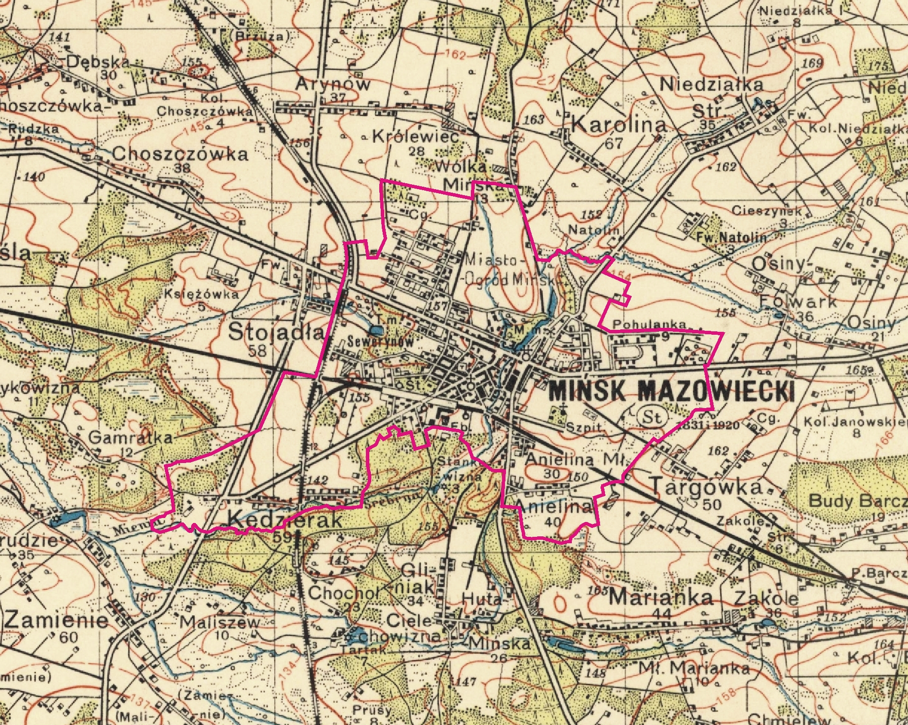 Mińsk Mazowiecki na mapie topograficznej WIG z 1937 (dodano współczesne granice miasta)